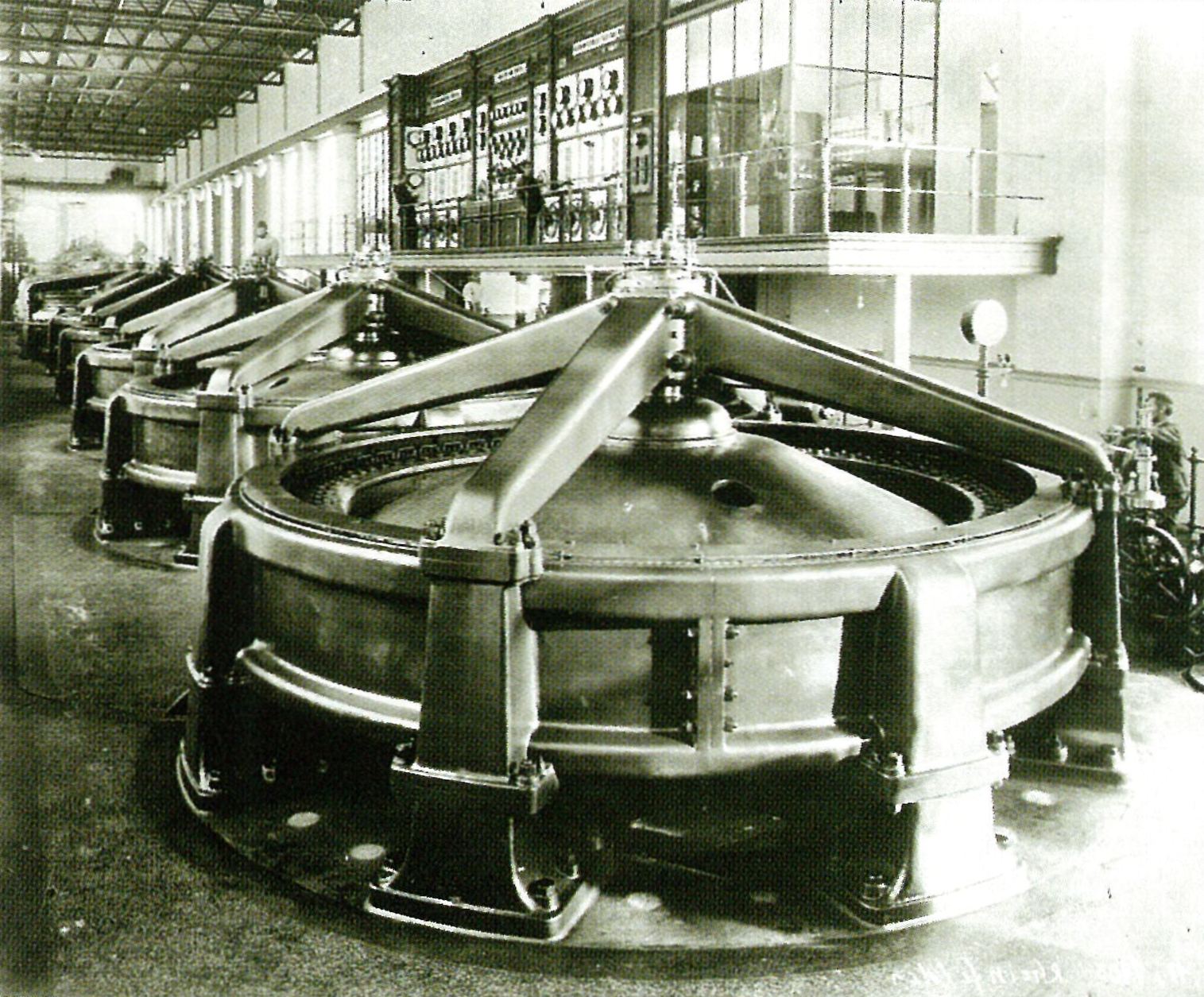 Maschinenhaus des alten Wasserkraftwerks Rheinfelden, Innenansicht um 1900, im Vordergrund die Drehstromgeneratoren.